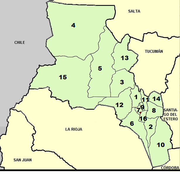 Carte de la province argentine de Catamarca avec les départements numérotés.